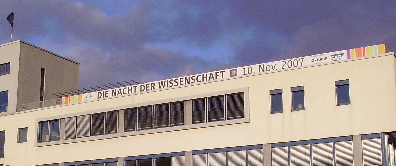 Werbung für die Nacht der Wissenschaft in der Metropolregion Rhein-Neckar